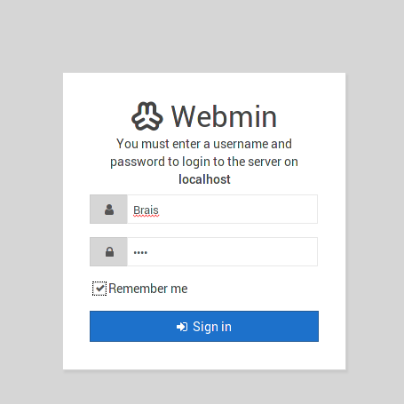 Inserir credenciais en Webmin.